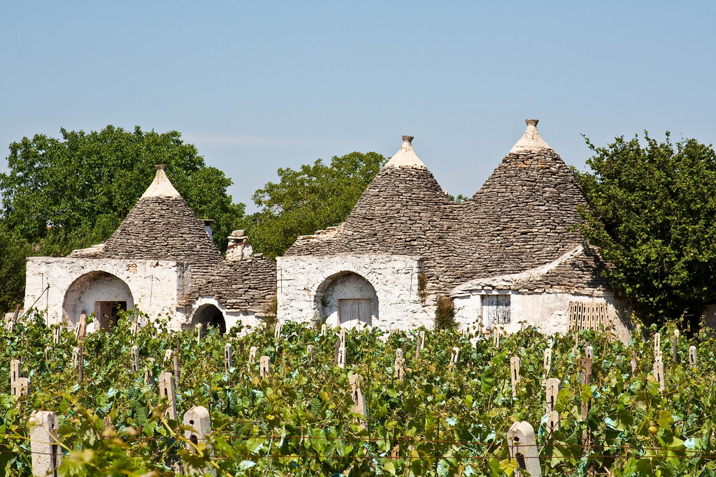 Trulli